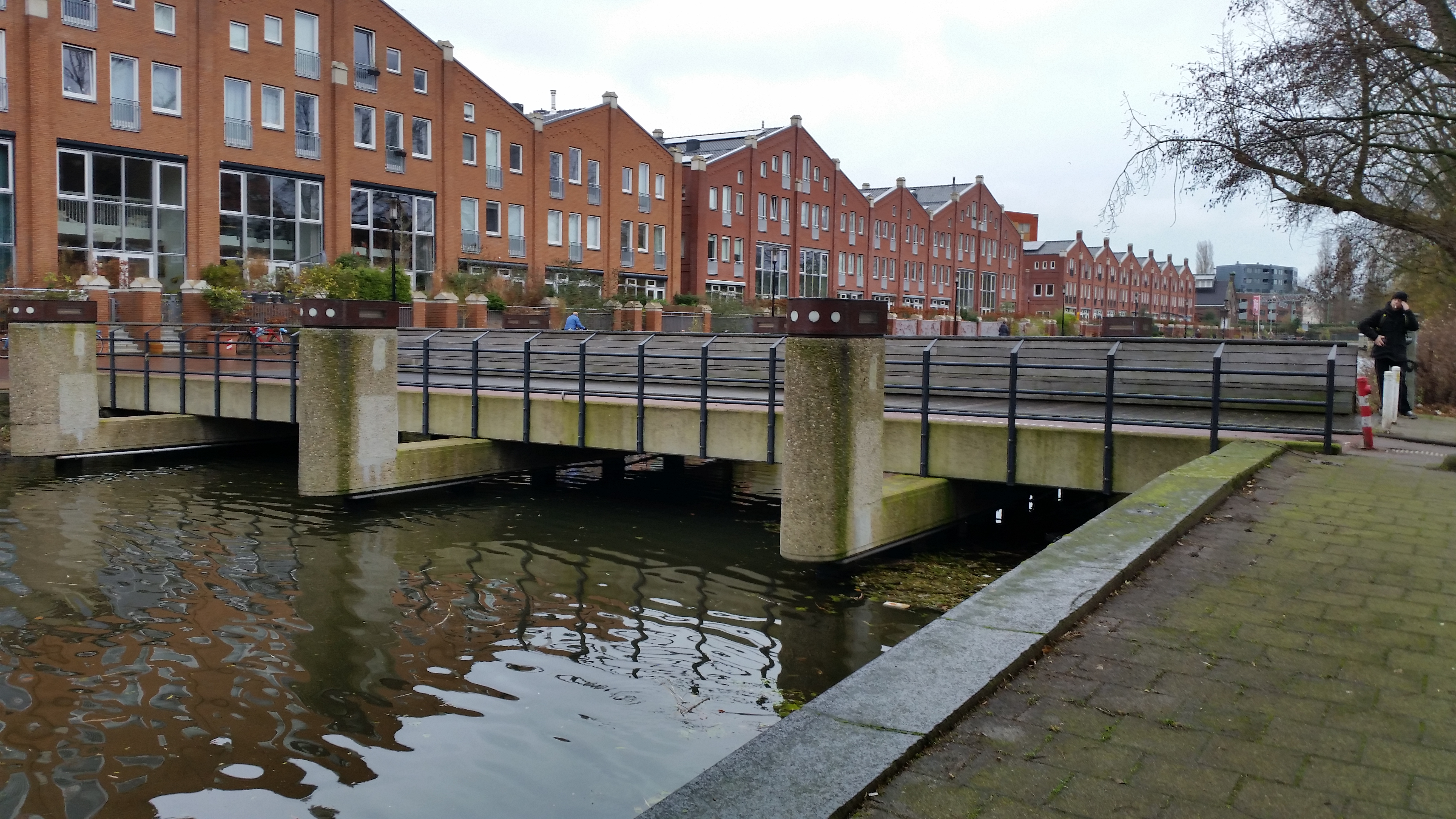 Zijaanzicht van Brug 355, Evert van der Wallbrug